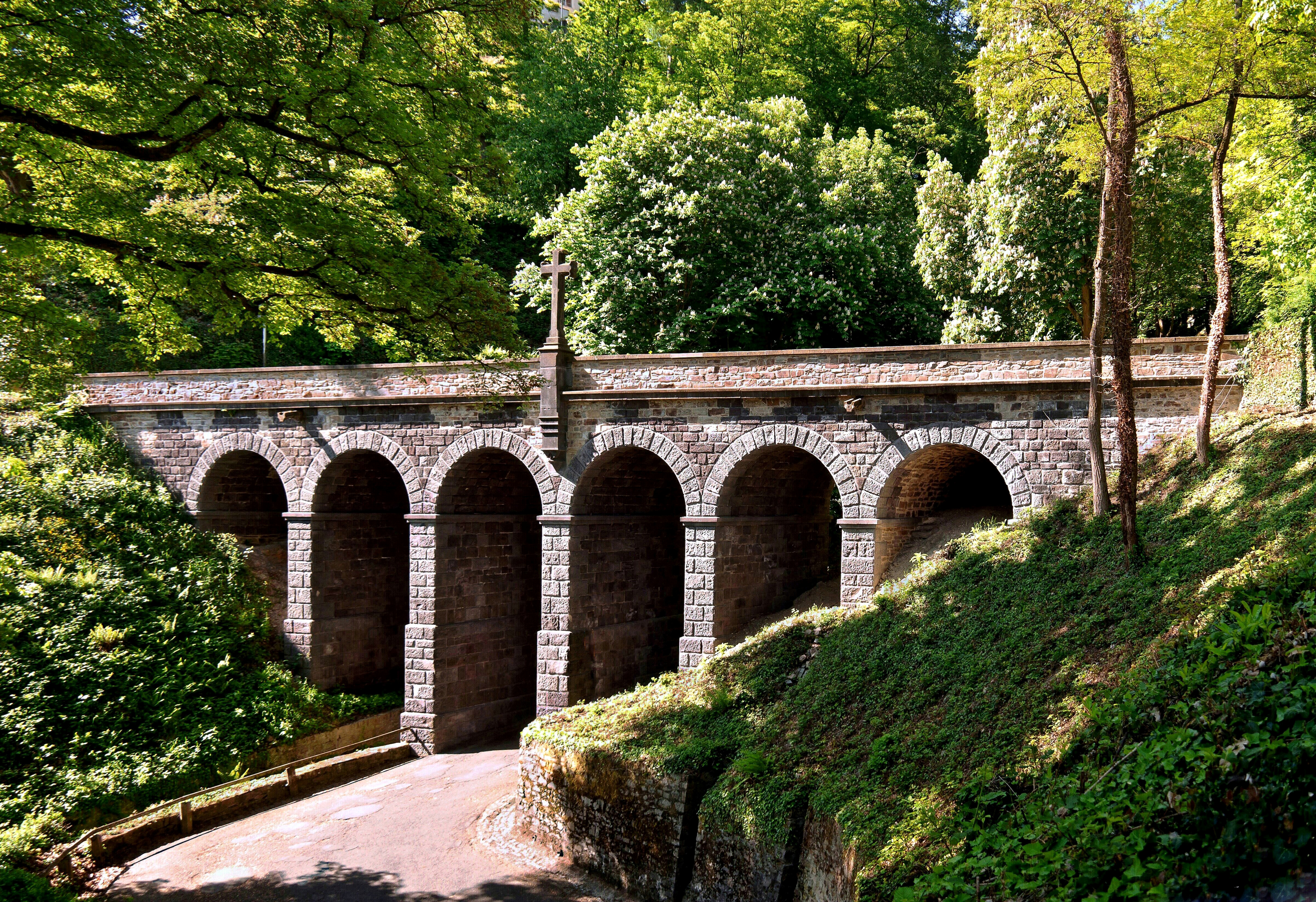 Das Viadukt im Park von Schloss Stolzenfels